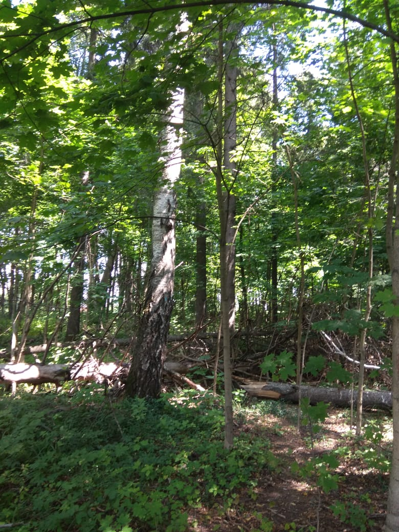 Лес в усадьбе Опалиха-Алексеевское